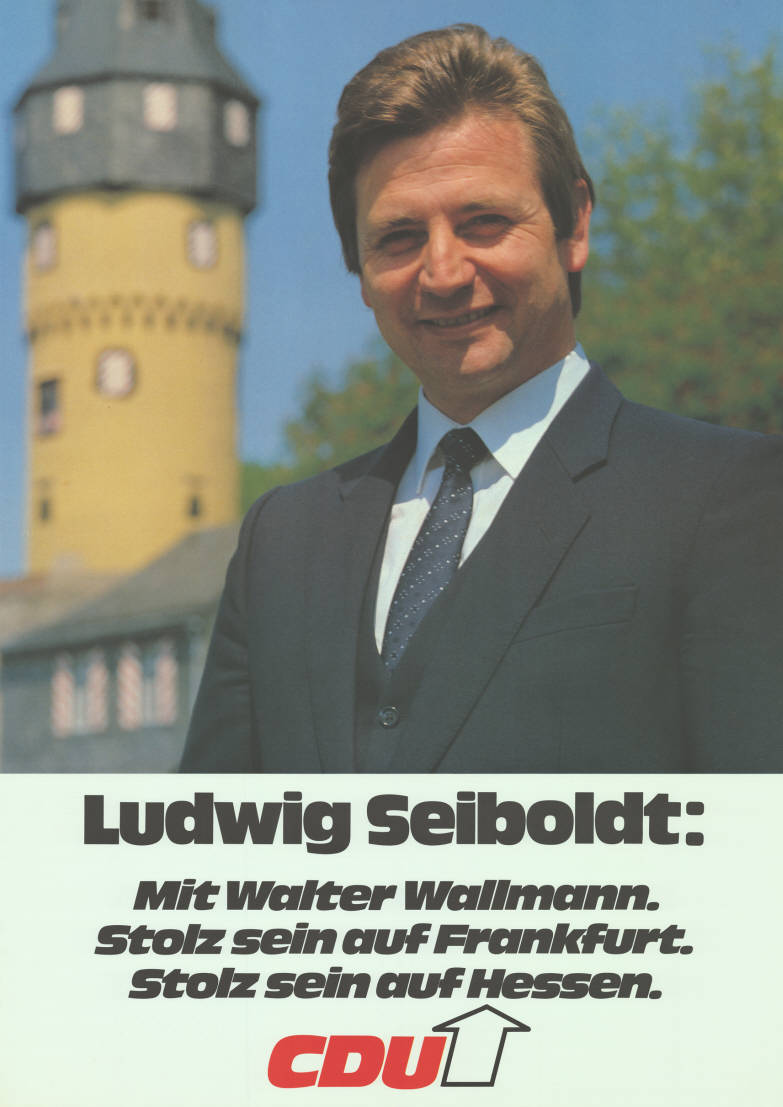 Ludwig Seiboldt: Mit Walter Wallmann. Stolz sein auf Frankfurt. Stolz sein auf Hessen. CDU Abbildung: Foto Plakatart: Kandidaten-/Personenplakat mit Porträt Objekt-Signatur: 10-007 : 611 Bestand: Landtagswahlplakate Hessen (10-007) GliederungBestand10-18: Landtagswahlplakate Hessen (10-007) » CDU Lizenz: KAS/ACDP 10-007 : 611 CC-BY-SA 3.0 DE